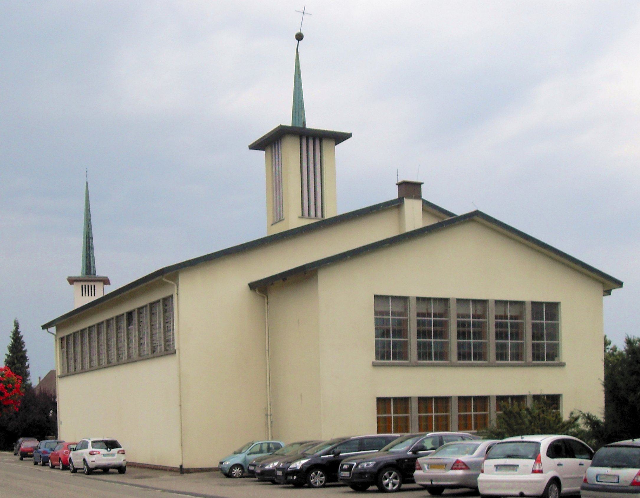 L'église Saint-Gall à Rittershoffen, côté est